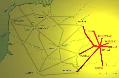 Voies Romaines autour de Bavay